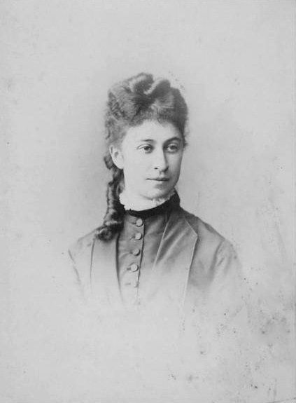 Графиня Екатерина Львовна Олсуфьева, ур. Соллогуб (1847—1902)